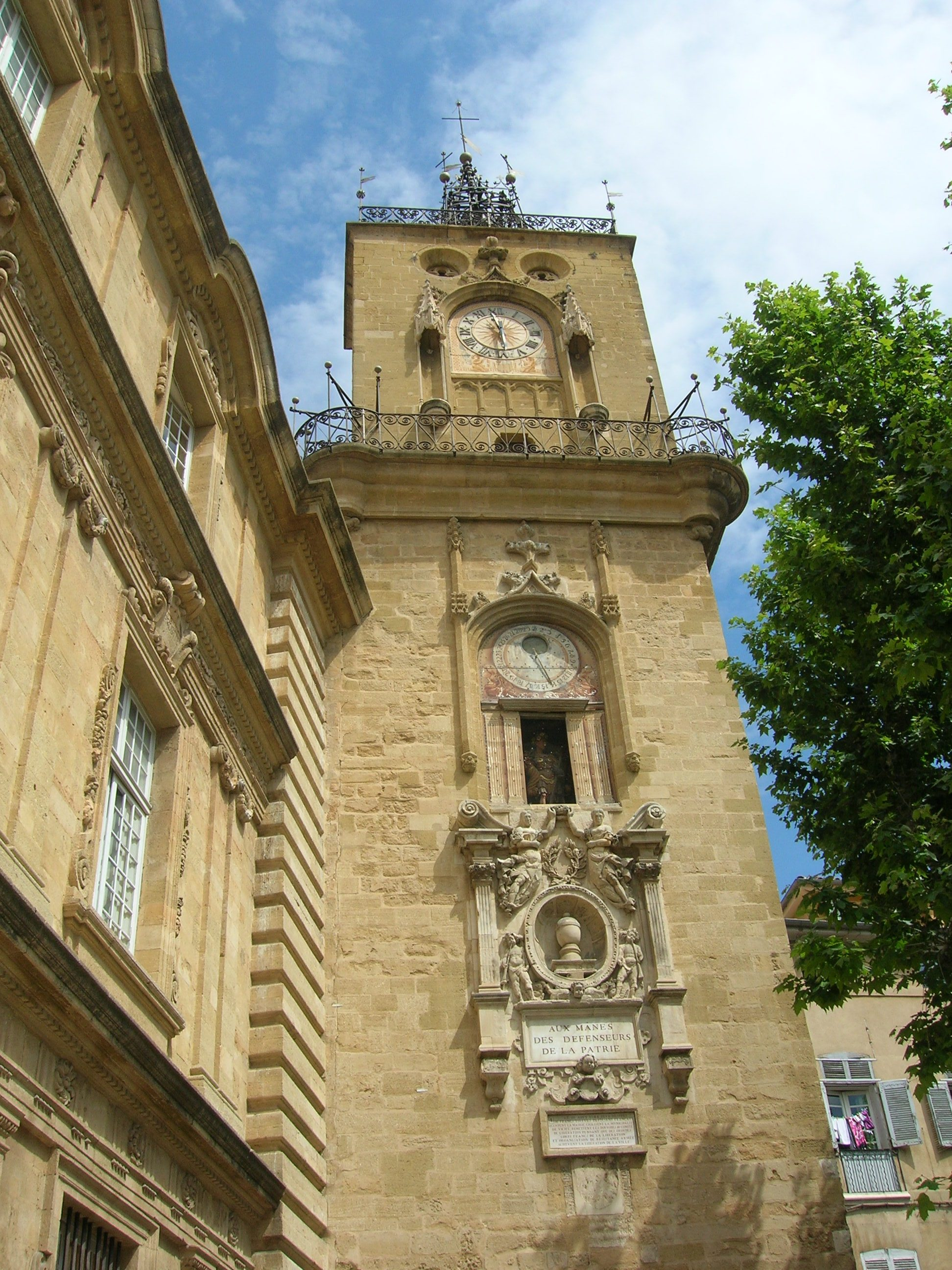 Beffroi zu Aix-en-Provence.